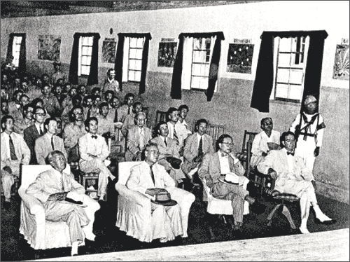 1950년 7월 부산 피란 시절 전황을 듣는 대한민국 각료(앞줄 왼쪽부터 이승만 대통령, 신익희 국회의장, 장면 국무총리, 무초 주한미국 대사, 뒷줄 맨 왼쪽은 허정 무임소장관, 맨 오른쪽 창가 옆은 윤영선 장관)